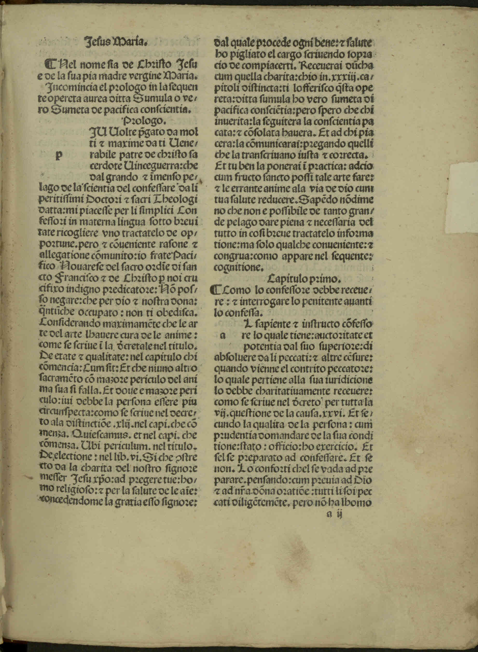 Sommola di pacifica coscienza. - Impressa e con ogni diligentia emendata questa aurea opereta nela cita de Bressa : per el venerabile miser pre. Baptista Farfengo, nel anno MCCCCLXXXXVII a di XII di septembre. - 111 c. ; a-o⁸ ; 4º .